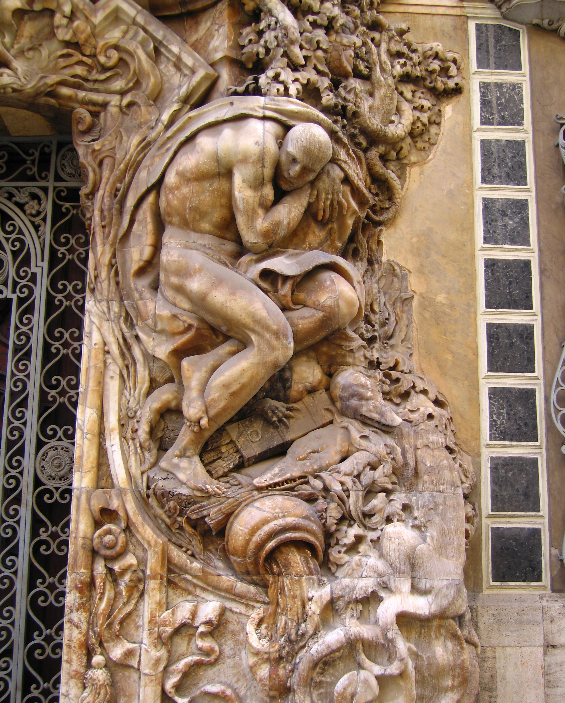 Palau del Marqués de Dosaigües